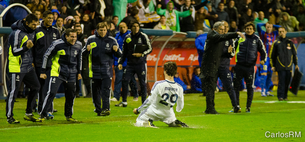 Morata